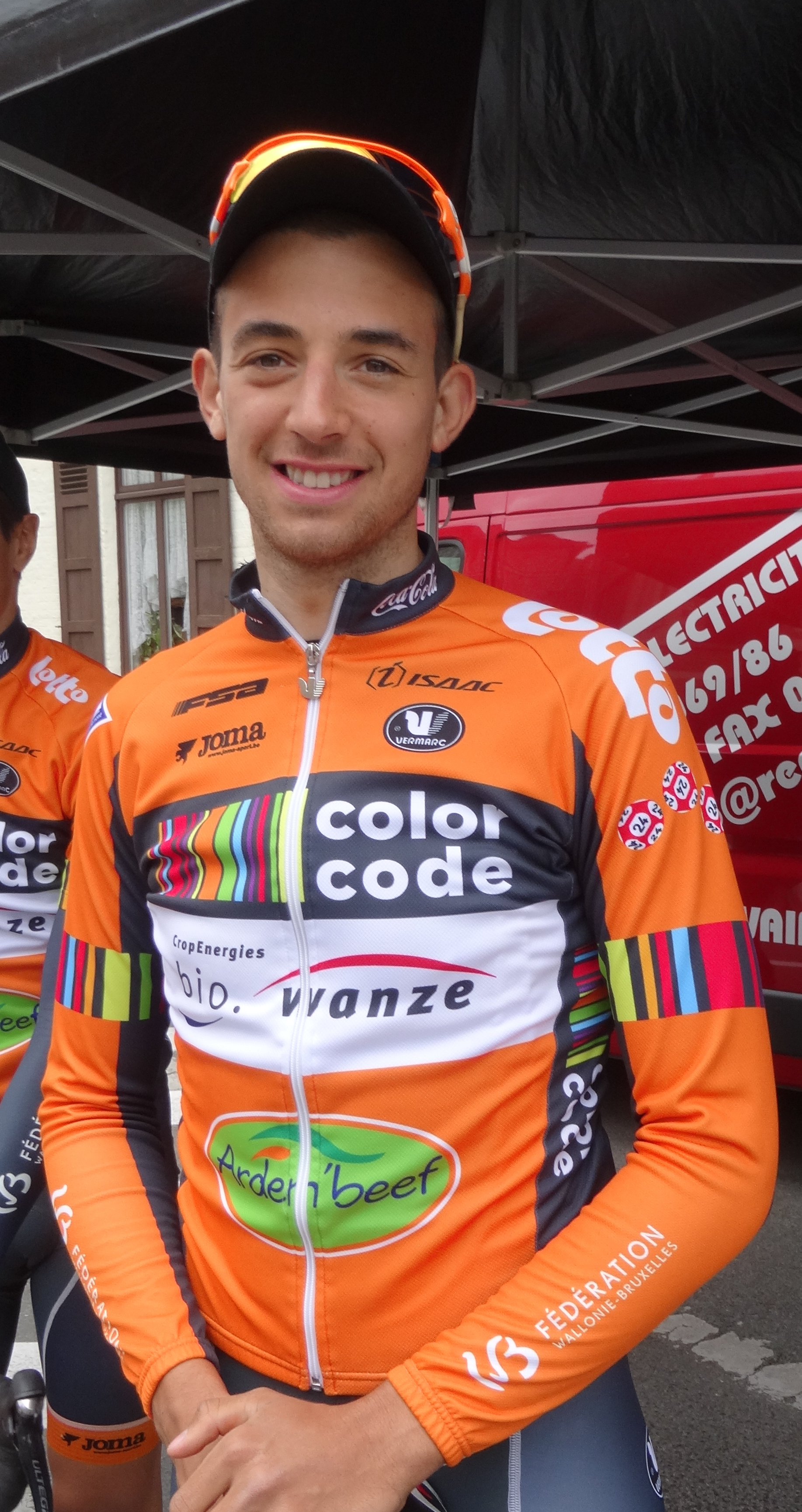 Triptyque des Monts et Châteaux 2014, étape 3, 6 avril 2014, départ de Belœil. Depicted person: Ludwig De Winter Depicted team: Color Code-Biowanze The creation of these files was made possible thanks to the organizers of the Triptyque des Monts et Châteaux 2014 English | français | +/−